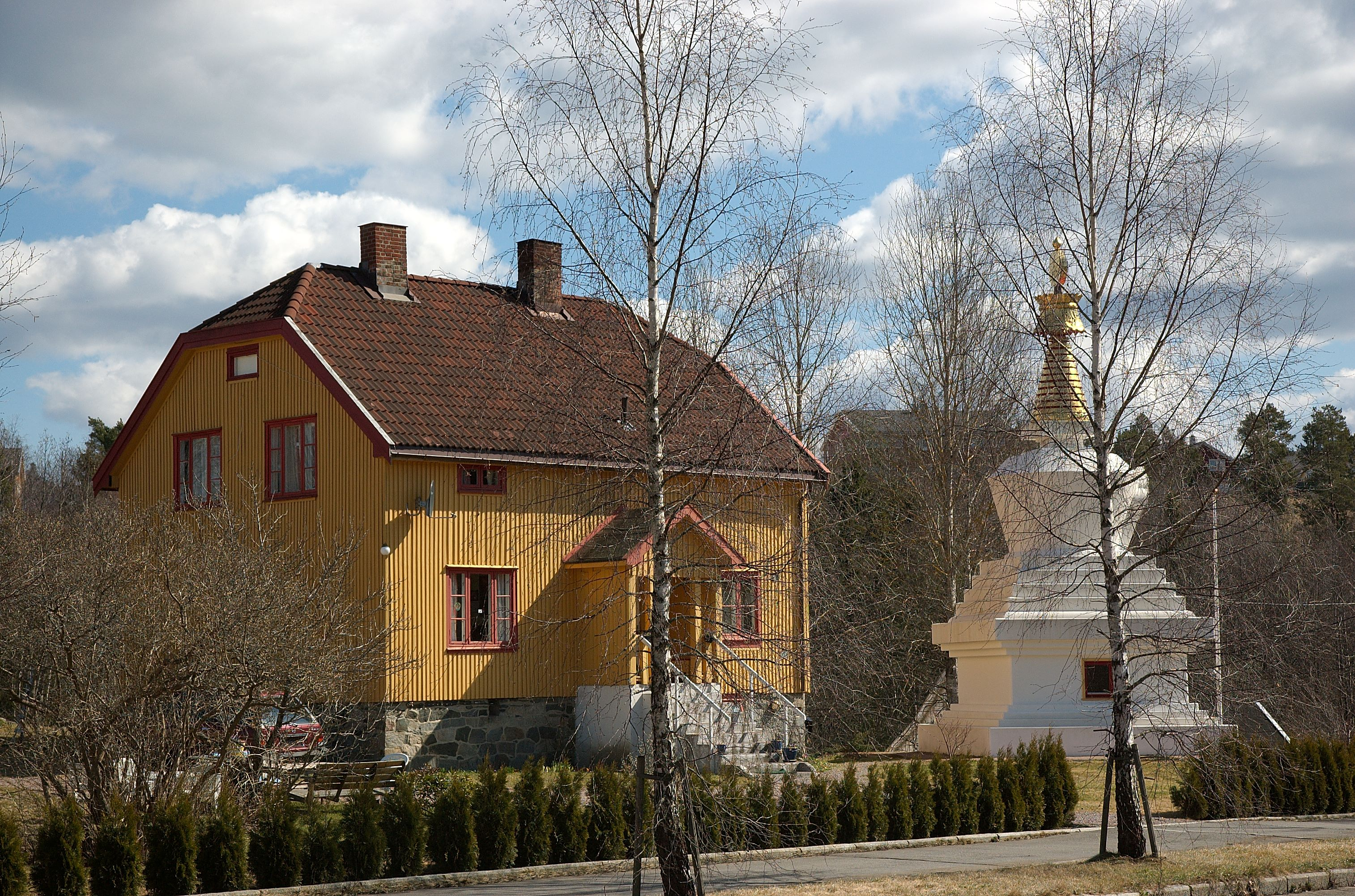 Karma Tashi Ling Buddhistsamfunn på Bjørndal i Oslo